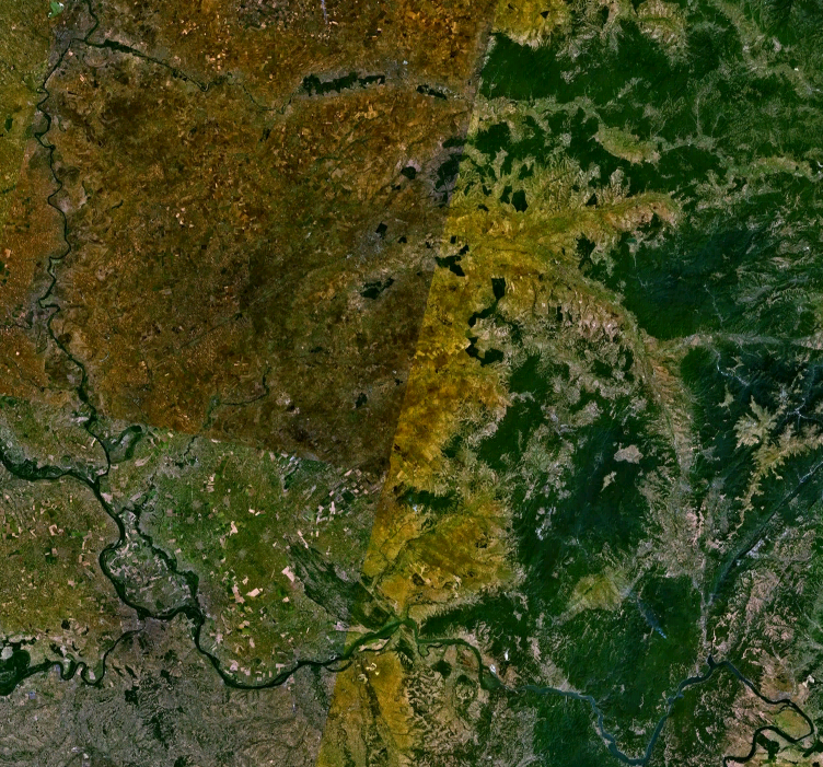 Снимак Баната у симулираним бојама, из НАСА-иног сателита Ландсат 7. Слика направљена помоћу програма NASA World Wind.